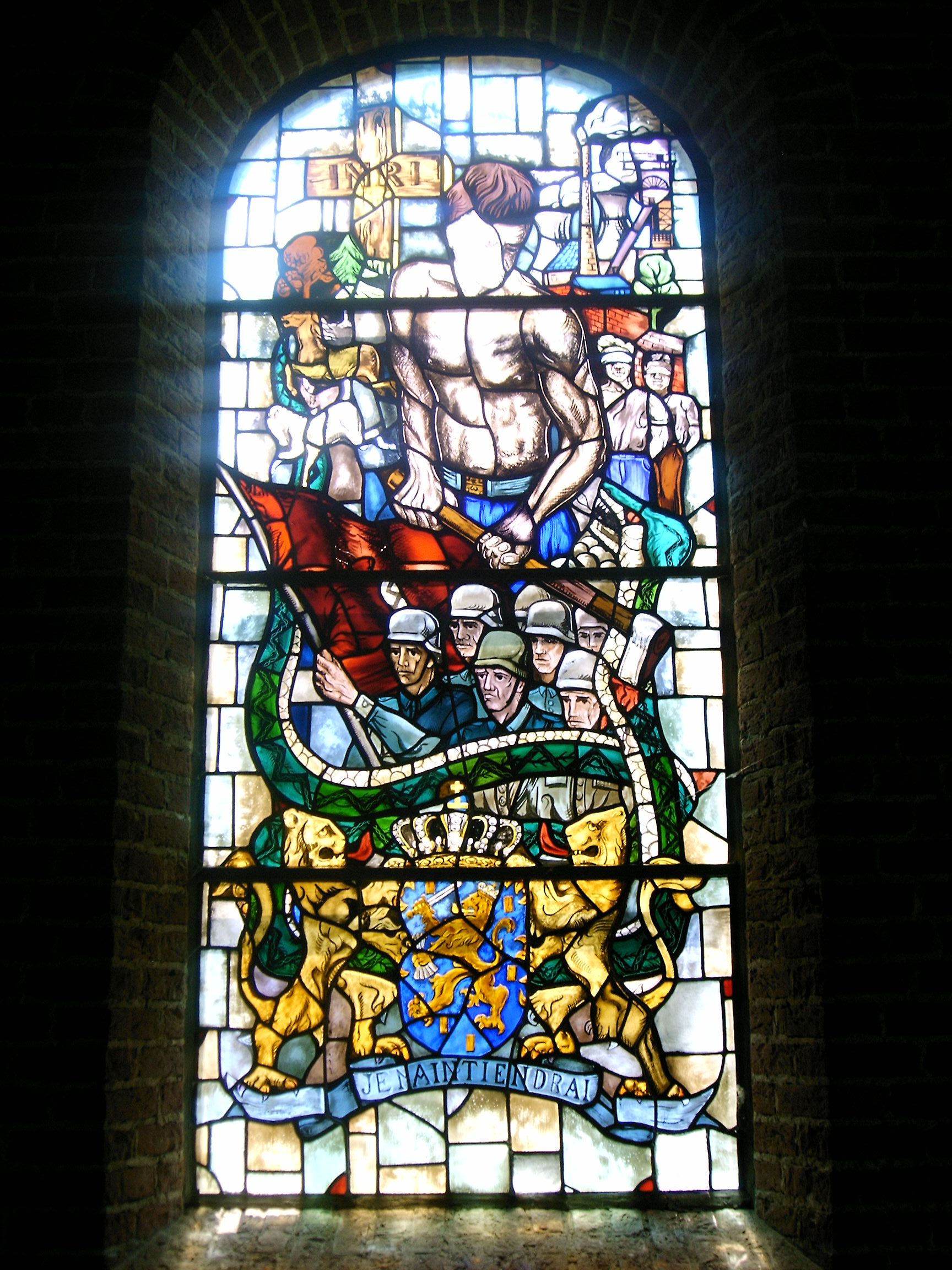 Ereveld stoottroepen, glas in lood raam